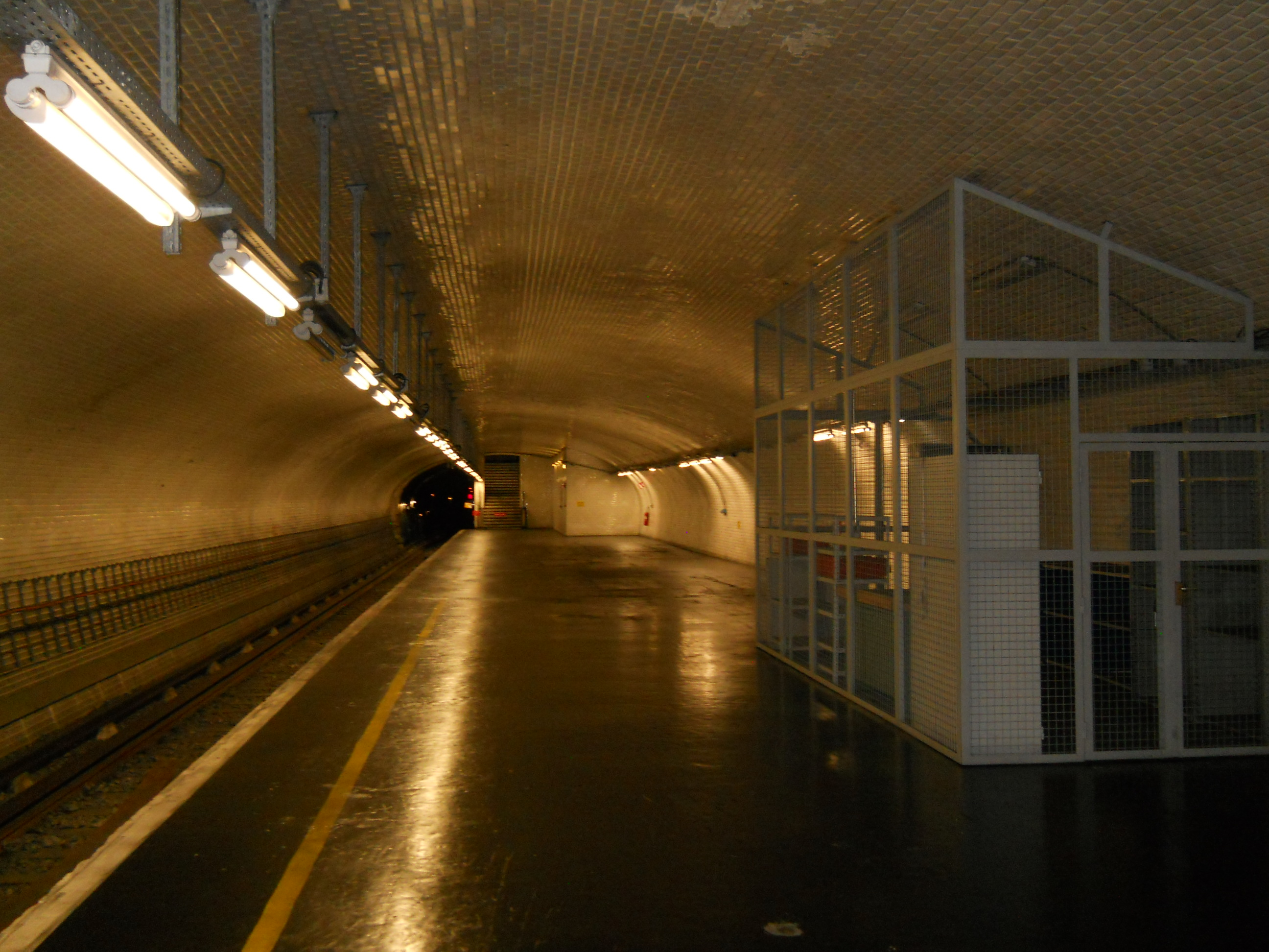 Le premier quai vu depuis le bas de l'ancien escalier d'accès, et à nouveau en direction de la bifurcation : l'accès au reste du quai n'était pas permis lors de la visite